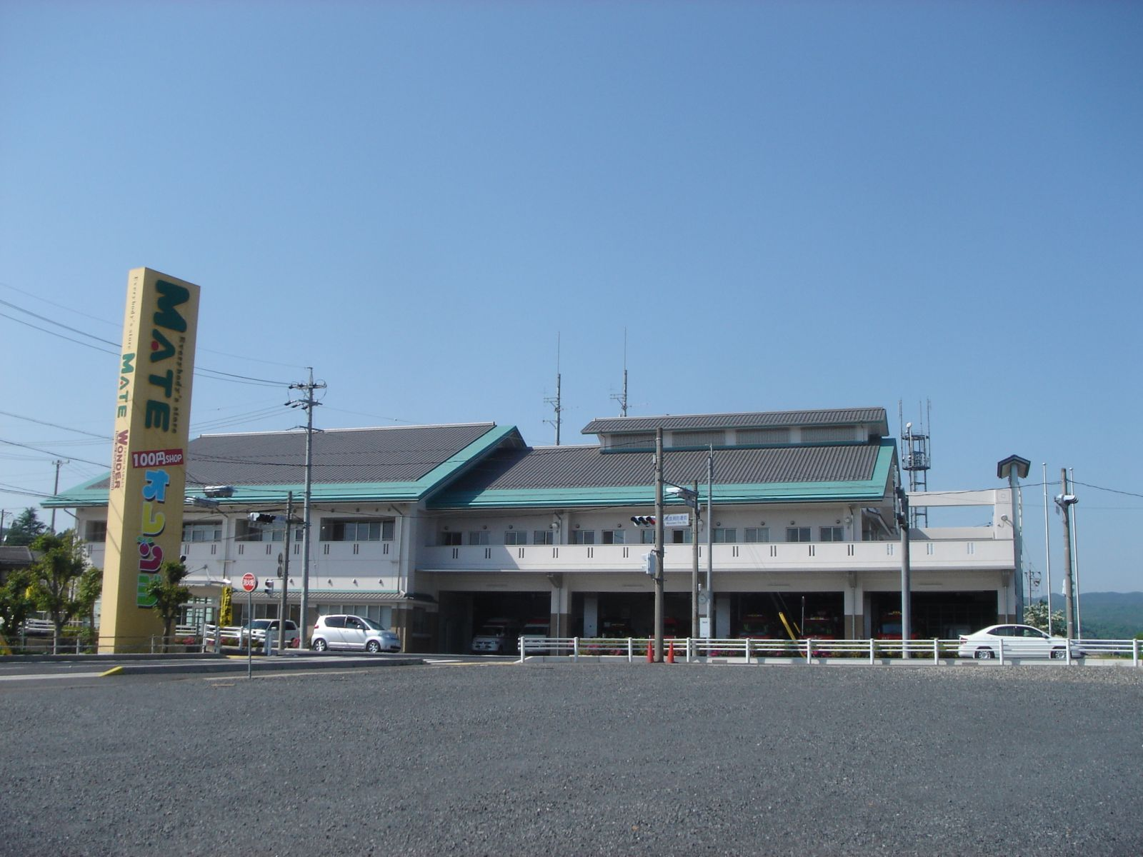 Mizunami city Fire derartment(ja:瑞浪市消防本部),Mizunami,Gifu,Japan(岐阜県瑞浪市)で撮影。